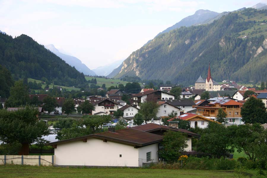 Ried im Oberinntal